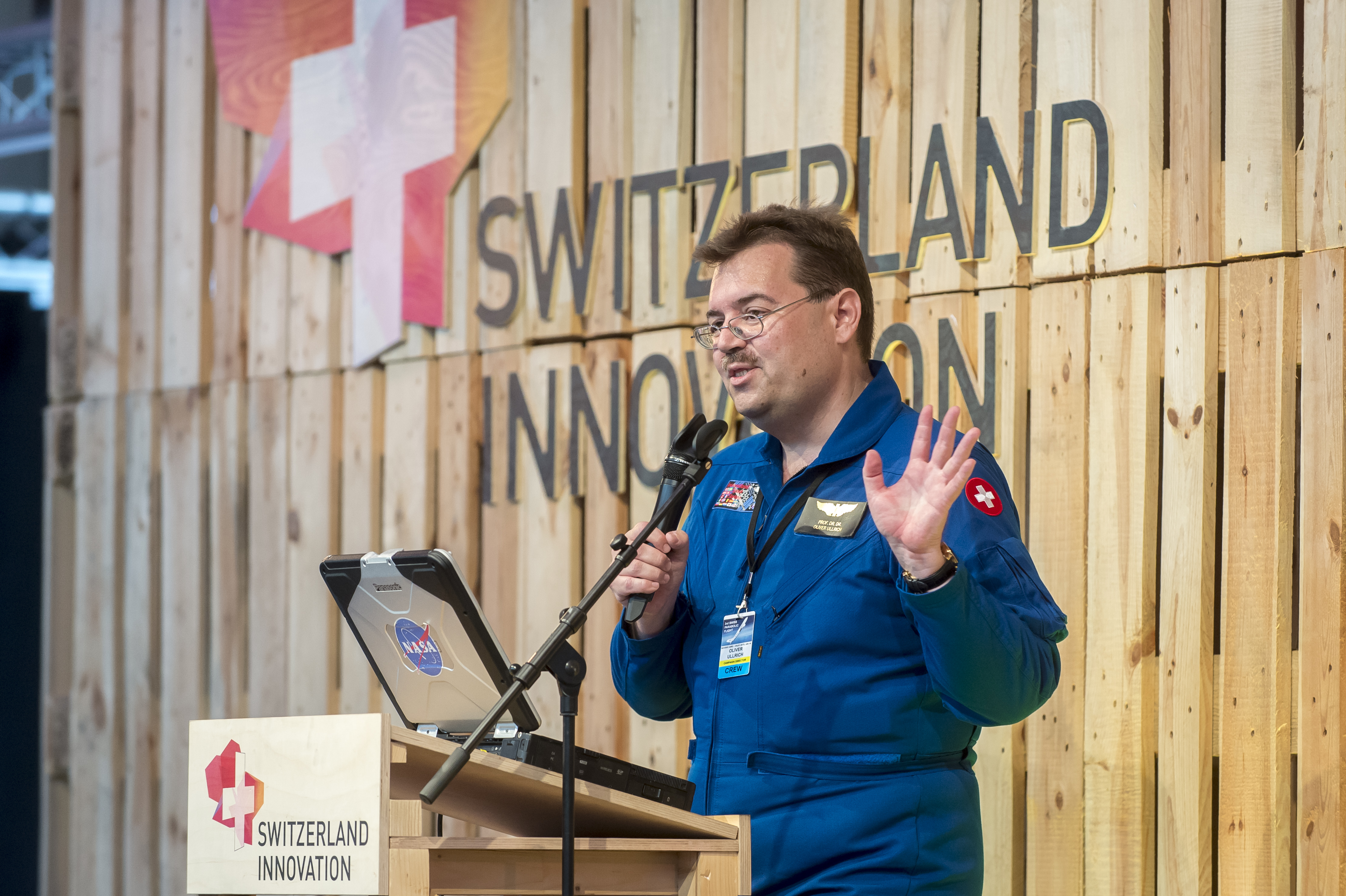 Oliver Ullrich vom UZH Space Hub, fotografiert von Regina Sablotny, Berlin